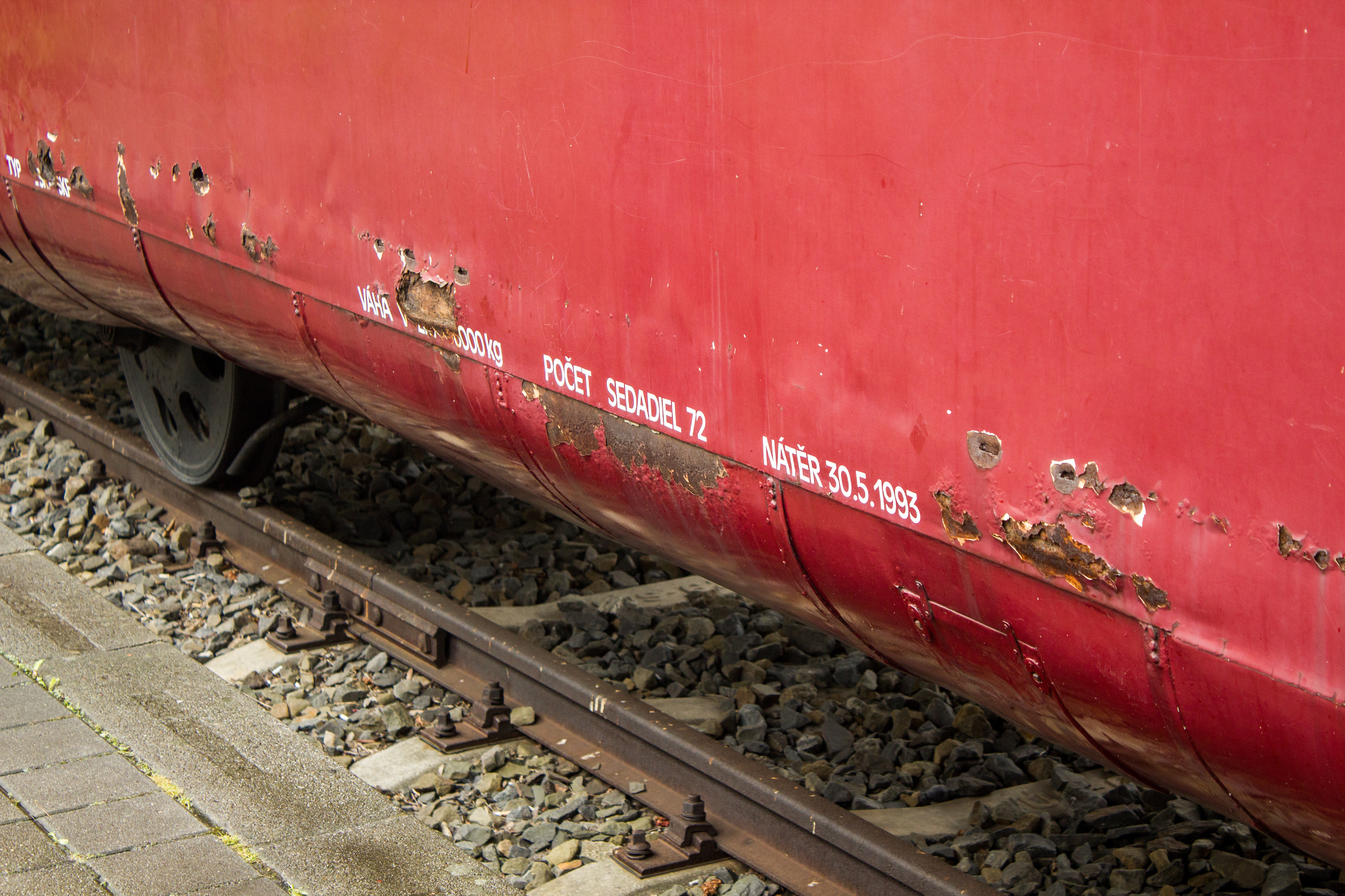 Vozová skříň dochovaného motorového vozu M 290.002 poškozená korozí po desítkách let odstavení vozu venku napospas vlivům počasí (i vandalům). Místy až 100% úbytky materiálu byly patrné zejména na rozhraní bočnic a podlahy a ve spodní části okenních otvorů.